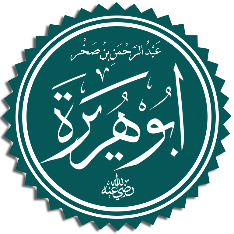 تخطيط اسم الصحابي أبي هريرة عبد الرحمن بن صخر الدوسي ملحوق بدعاء الرضى عنه